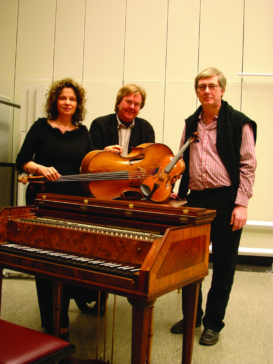 Abegg Trio 2006 (Bild vom Titel des Magazins "Ensemble" Juni 2006, Carsten Dürer)